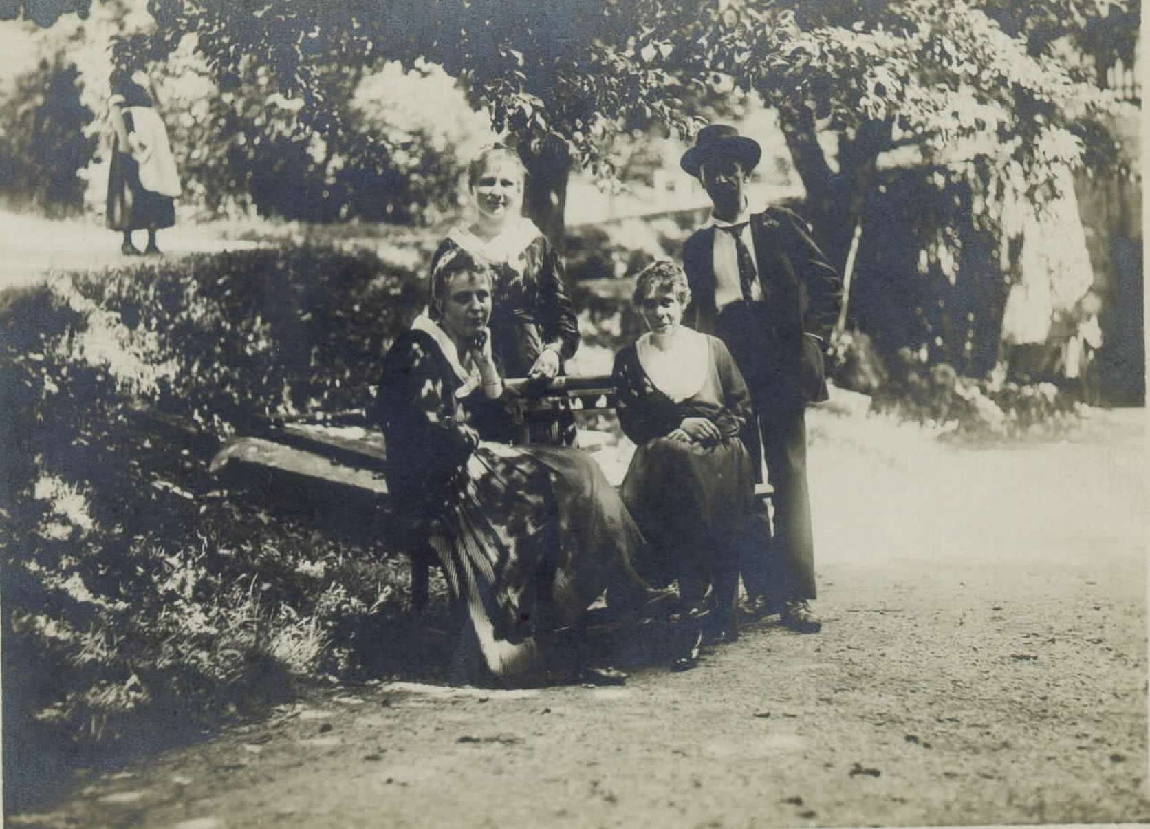 Ivan Cankar v družbi na Rožniku med letoma 1900 in 1910.